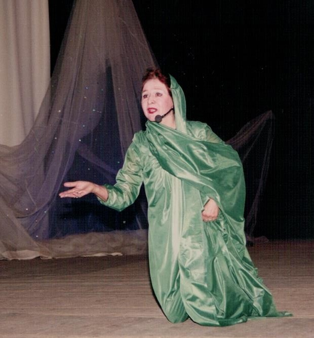 Аҙнабаева Зилә Рамаҙан ҡыҙы Башҡортостан Республикаһының атҡаҙанған мәҙәниәт хеҙмәткәре